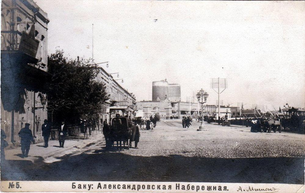 Баку. Александровская набережная.Фотограф А.Мишон